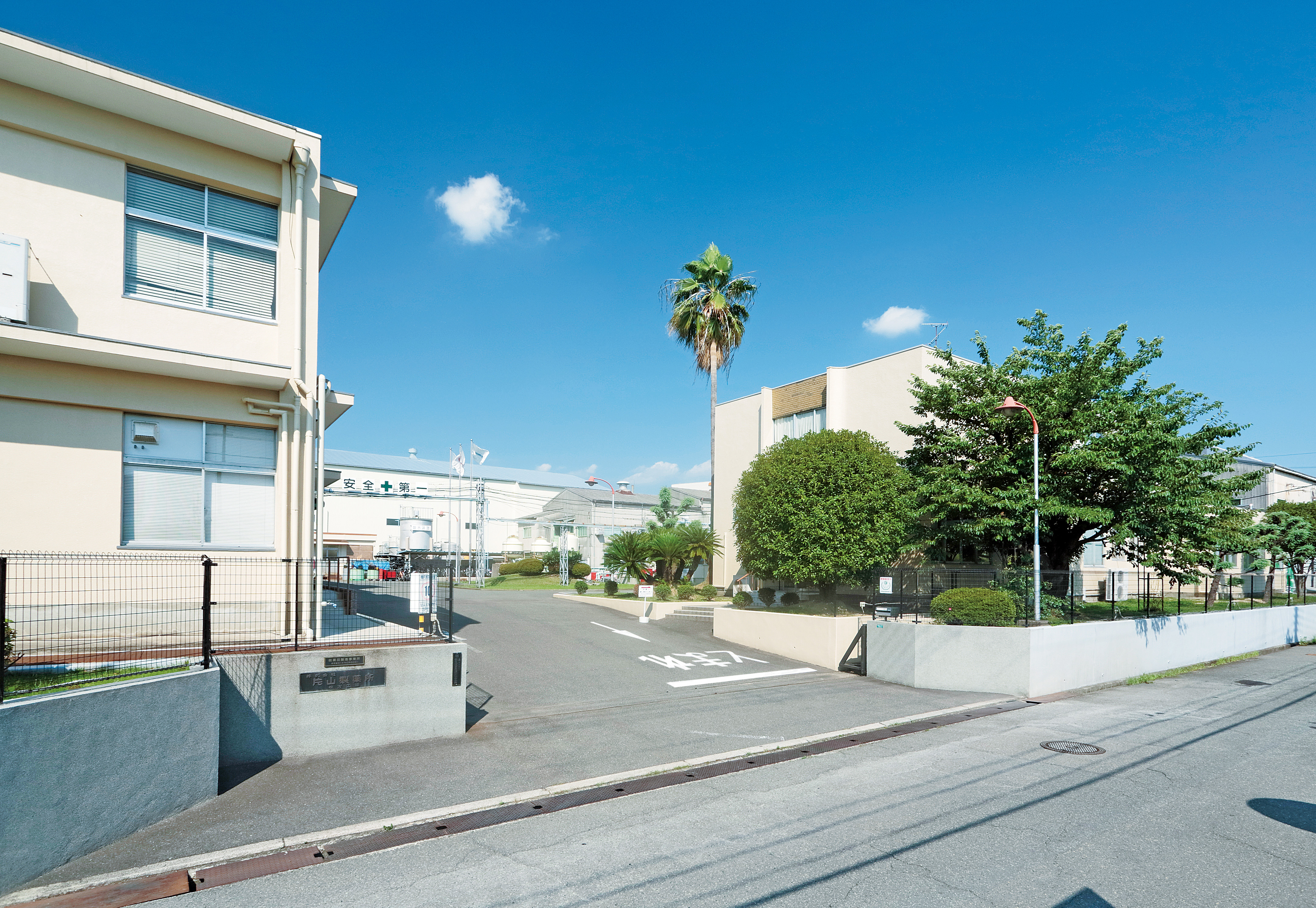 片山製薬所 本社